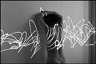 série "Writing with Light" (c)Ruth Bains Hartmann